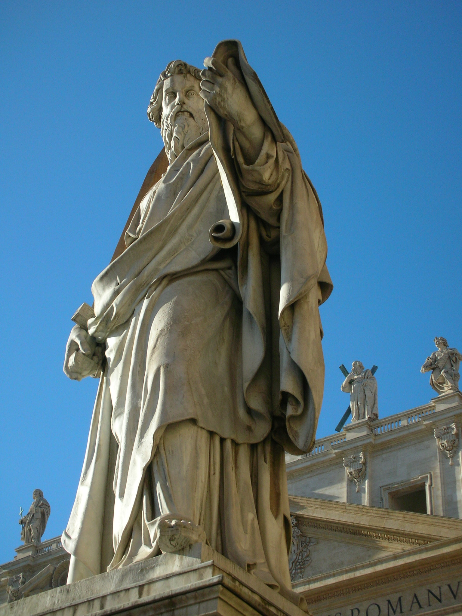 Statua di San Paolo in Piazza San Pietro (Roma)